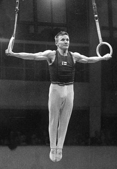 Kalevi Suoniemi